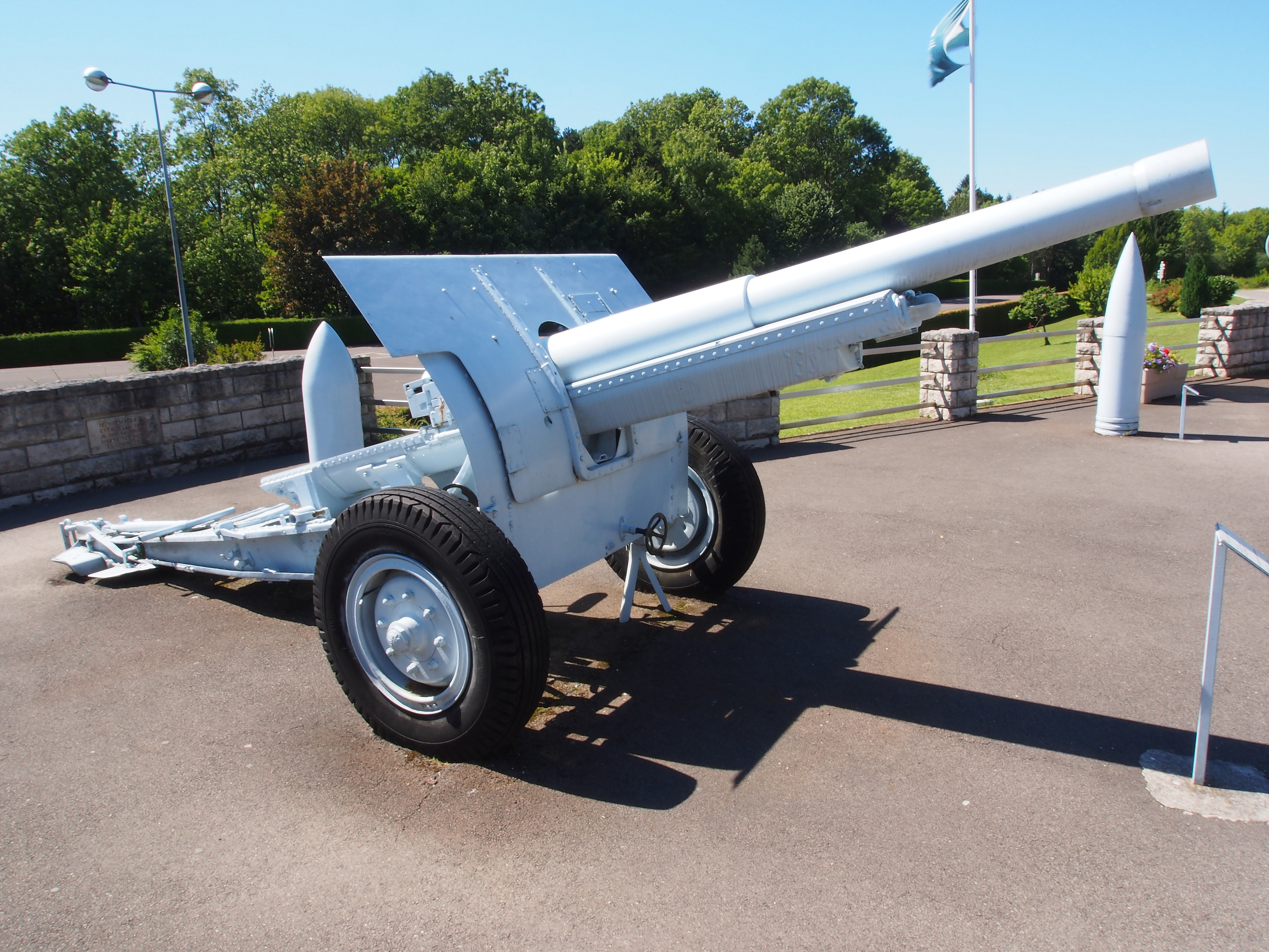 105L Schneider - model 1913